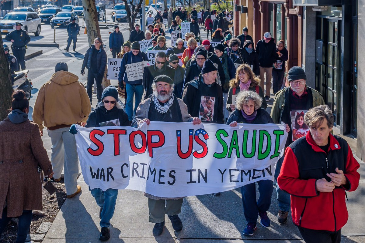 065 Procession